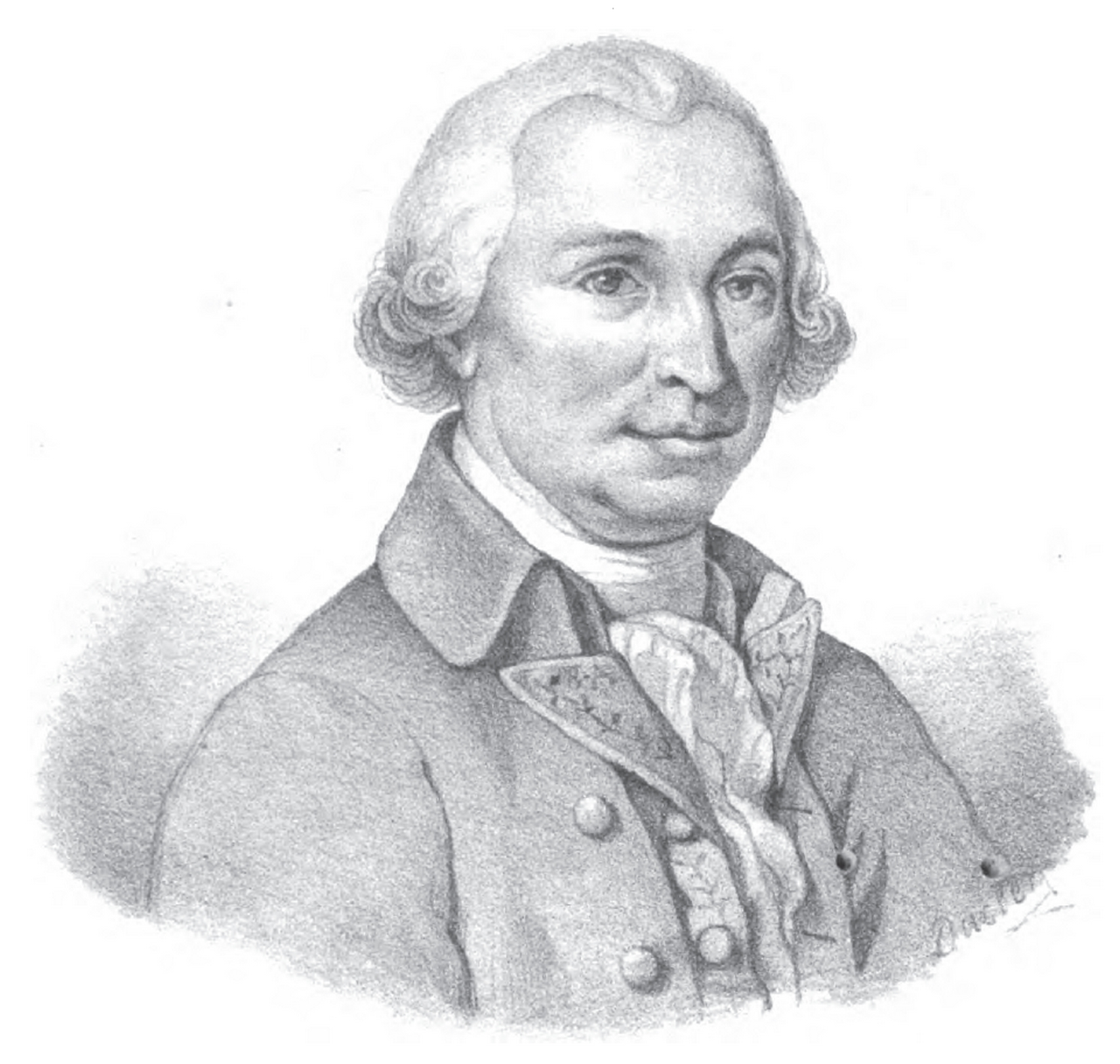 Pierre Mathieu (1704-1778)